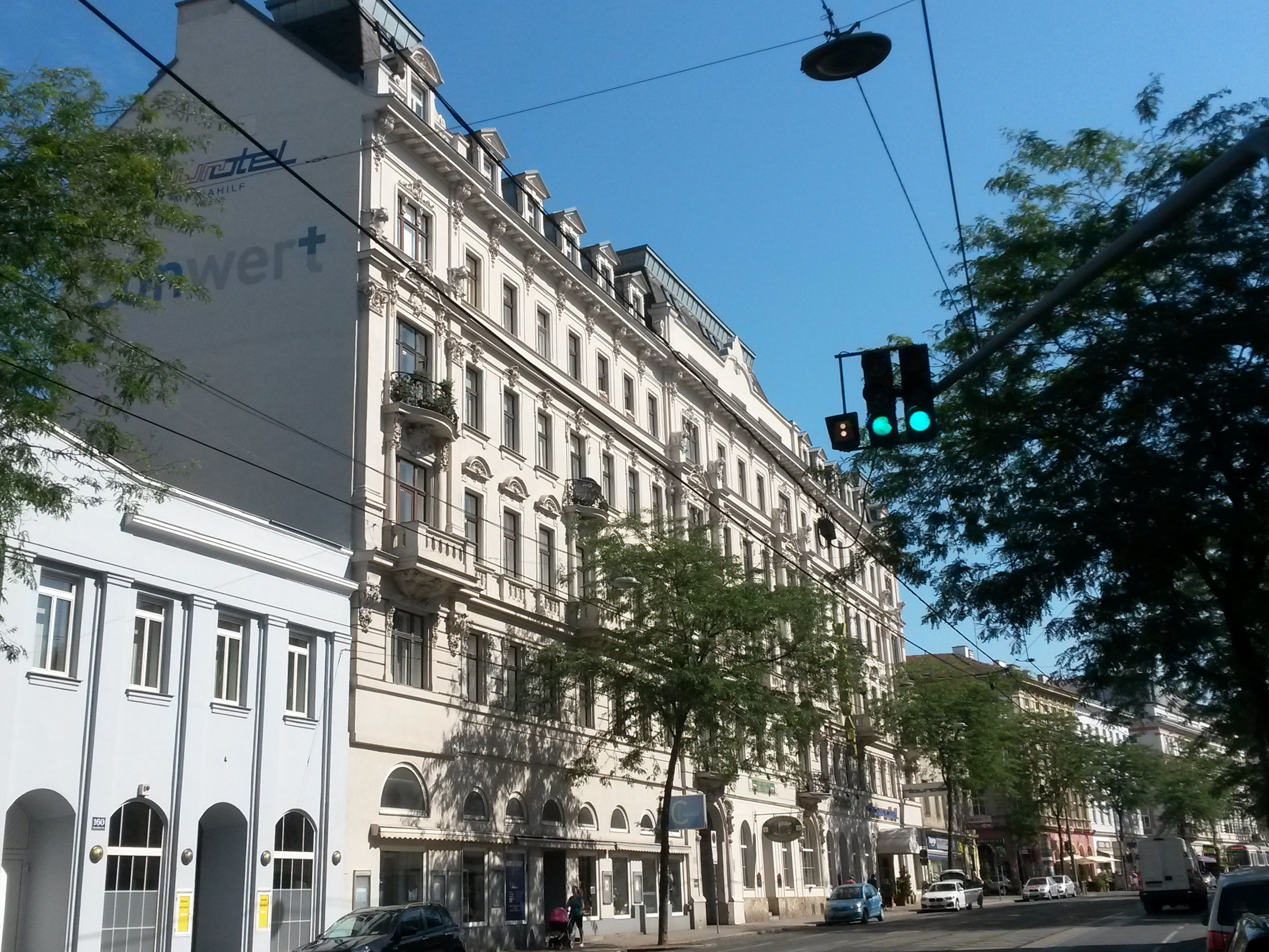 Tourotel Mariahilf Wien in Wien 15., Mariahilfer Straße 156-158